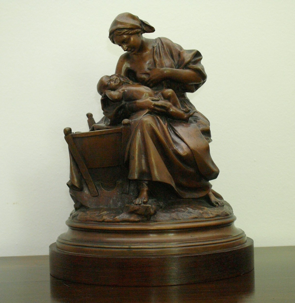 Fénykép ifj. Vastagh György Anyaság c. szobráról (1922)